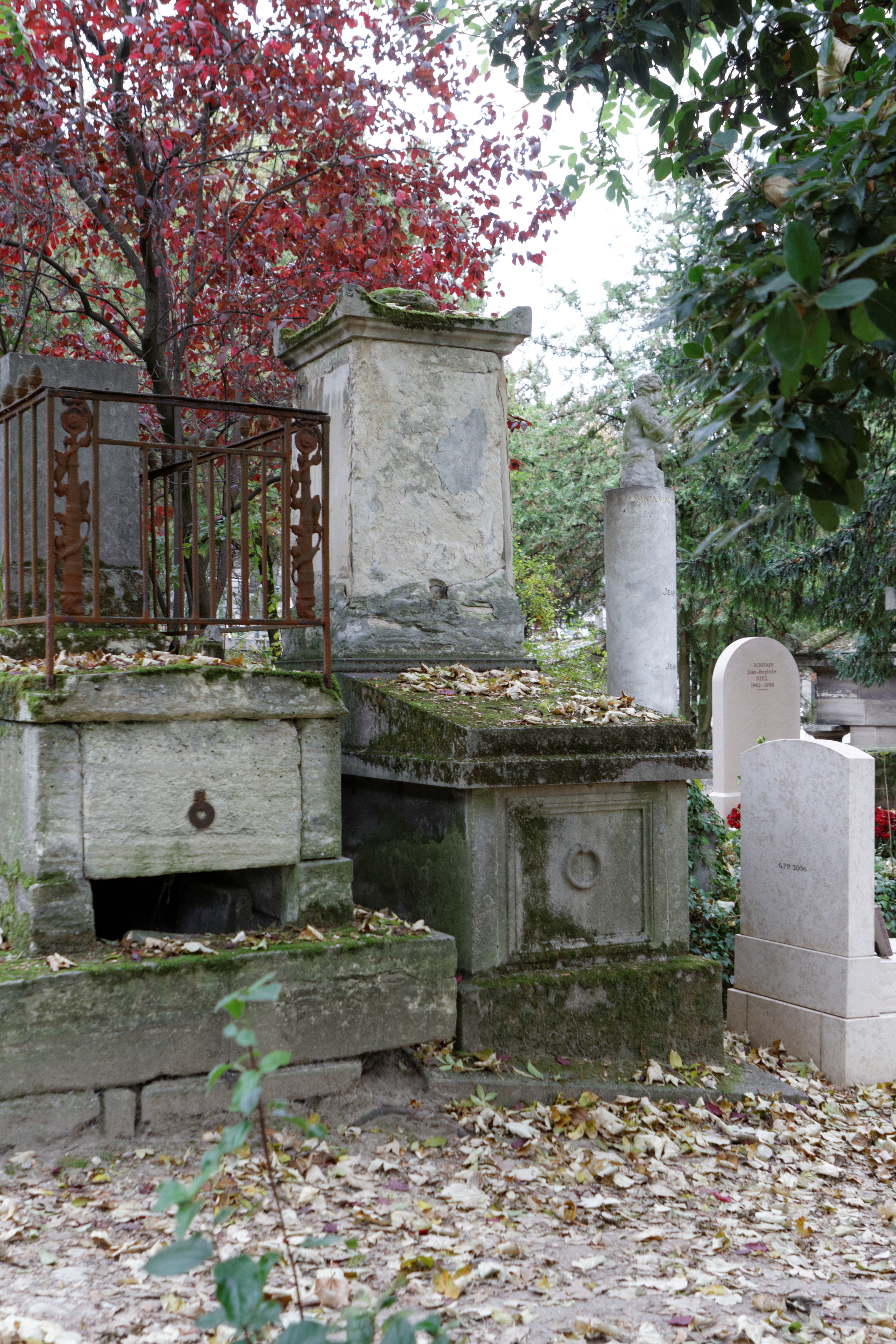 Sépulture de Louis-Joseph-Ferdinand Hérold (1791-1833), compositeur ; Adélaïde-Élise Hérold née Rollet (1806-1861), épouse de Ferdinand Hérold ; Jeanne-Gabrielle Hérold, née Pascal (1771-1860), mère de Ferdinand Hérold ; Eugène Hérold, Eugène-Louis Hérold (1859-1861). Monument orné à l'origine d'« un bas-relief représentant une lyre dont les cordes sont rompues, au travers de laquelle est passée une branche de cyprès. ». Le sommet du monument était décoré d'une couronne de laurier. Monument construit par M. Novio, sculpteur-marbrier. (Marty, 1839)